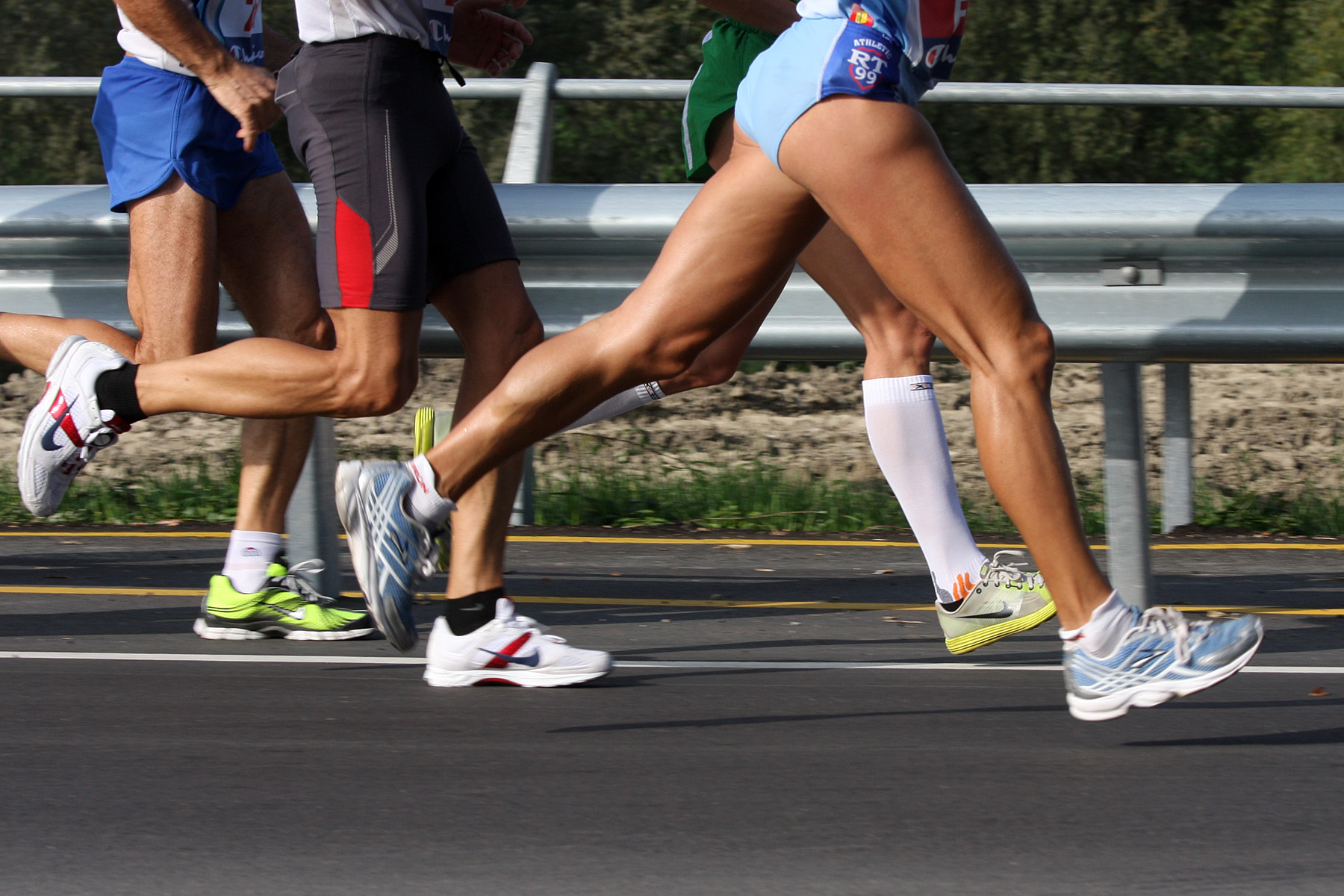 Maratona di Carpi